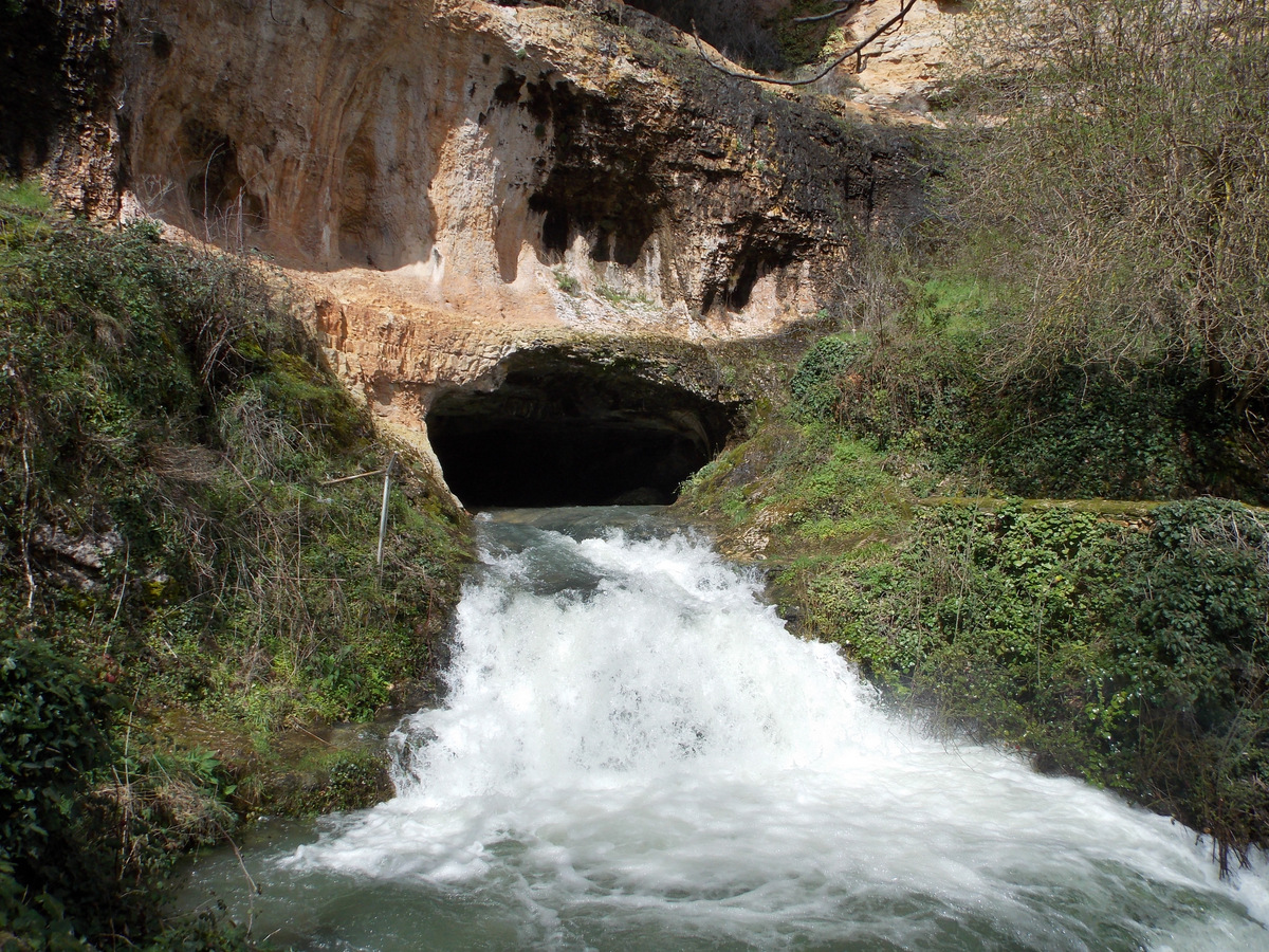 Curso de agua a través del pueblo de Orbaneja del Castillo en crecida.